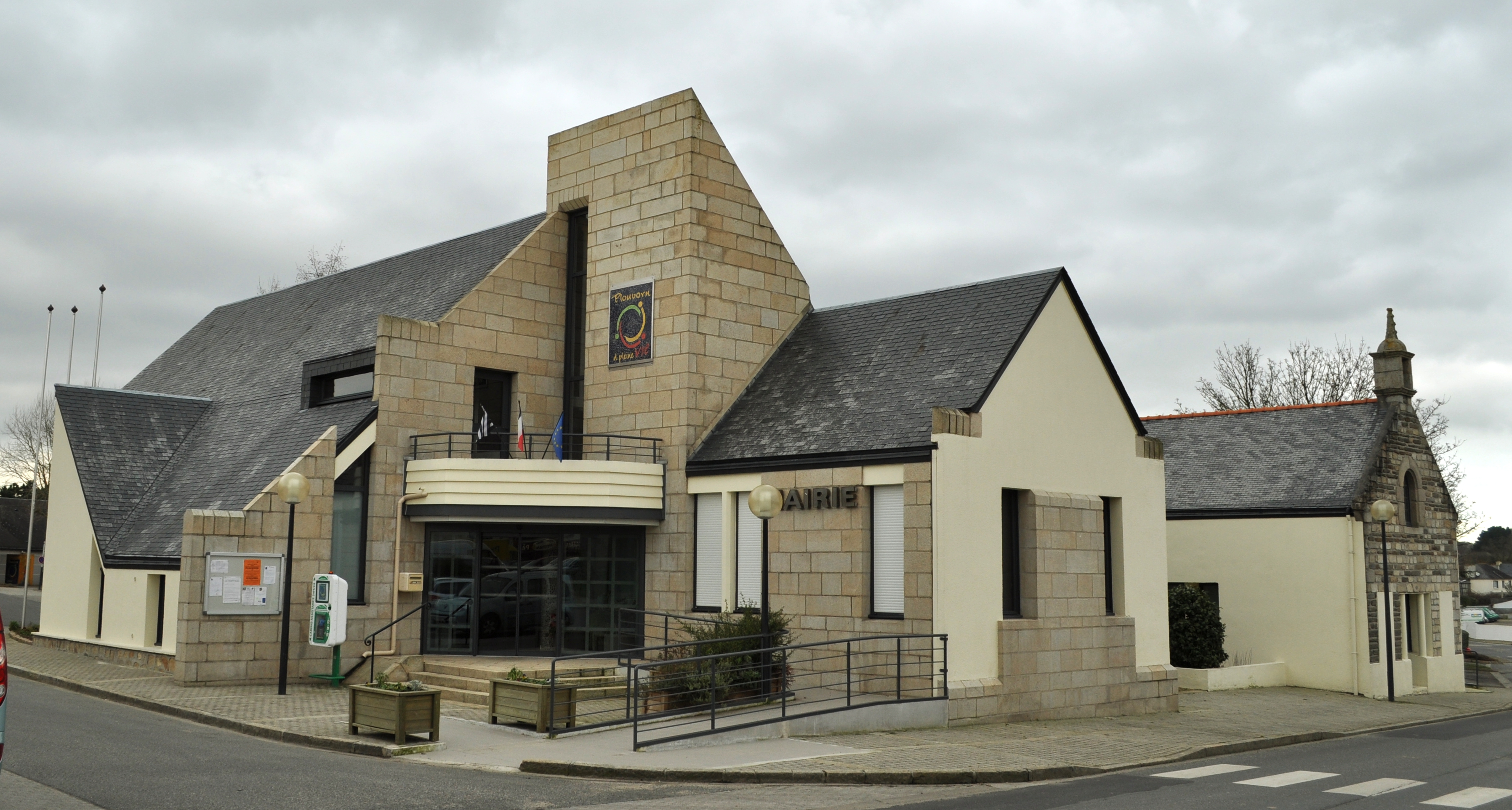 Ti-kêr Plouvorn.